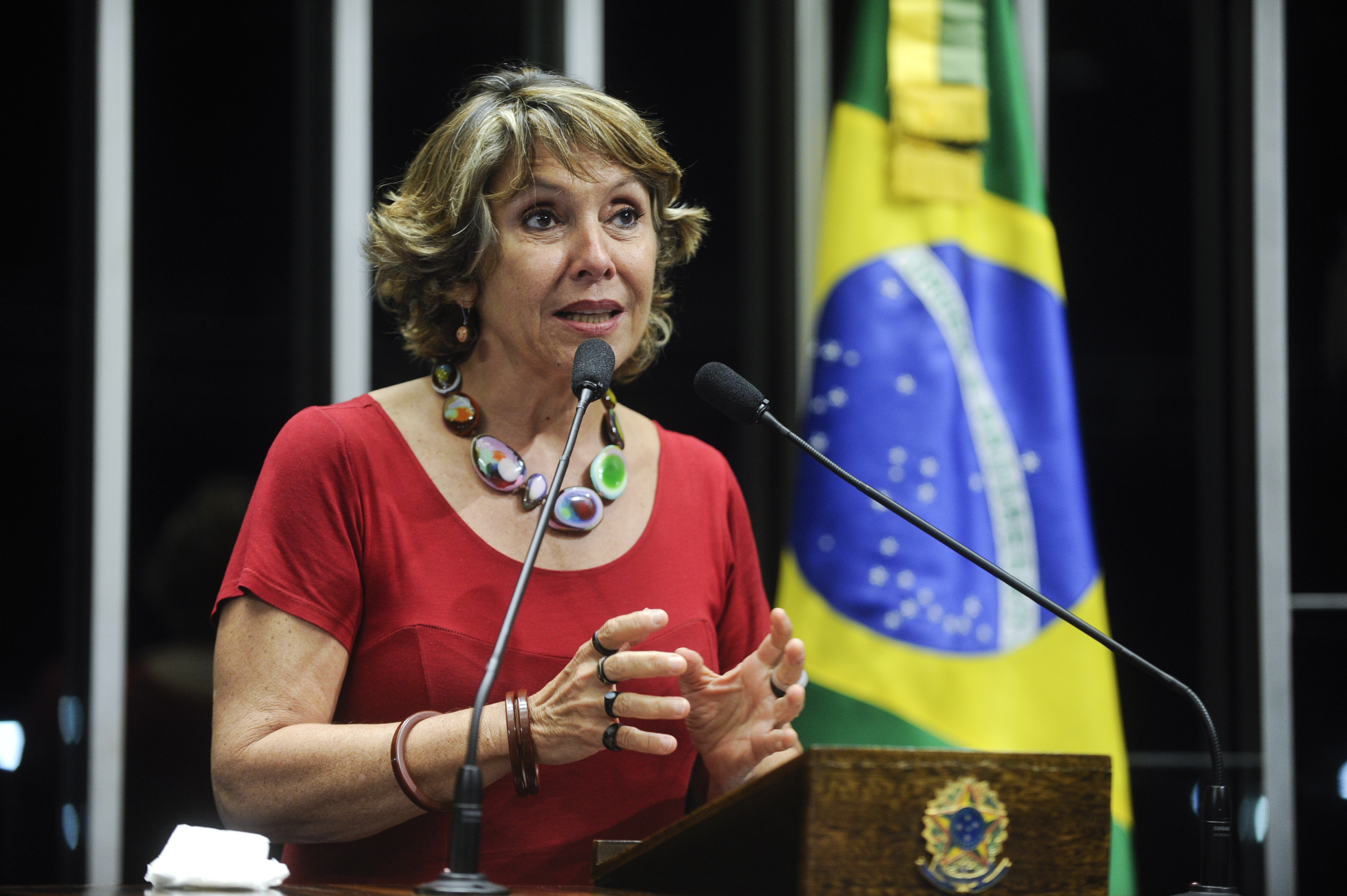 Plenário do Congresso durante sessão solene destinada ao lançamento da campanha nacional “16 Dias de Ativismo pelo fim da Violência Contra as Mulheres". A campanha teve início em 1991, por iniciativa do Centro de Liderança Global de Mulheres (Center for Women’s Global Leadership - CWGL), com o objetivo de promover o debate e denunciar as várias formas de violência contra as mulheres no mundo. Em discurso, deputada Erika Kokay (PT-DF). Foto: Marcos Oliveira/Agência Senado